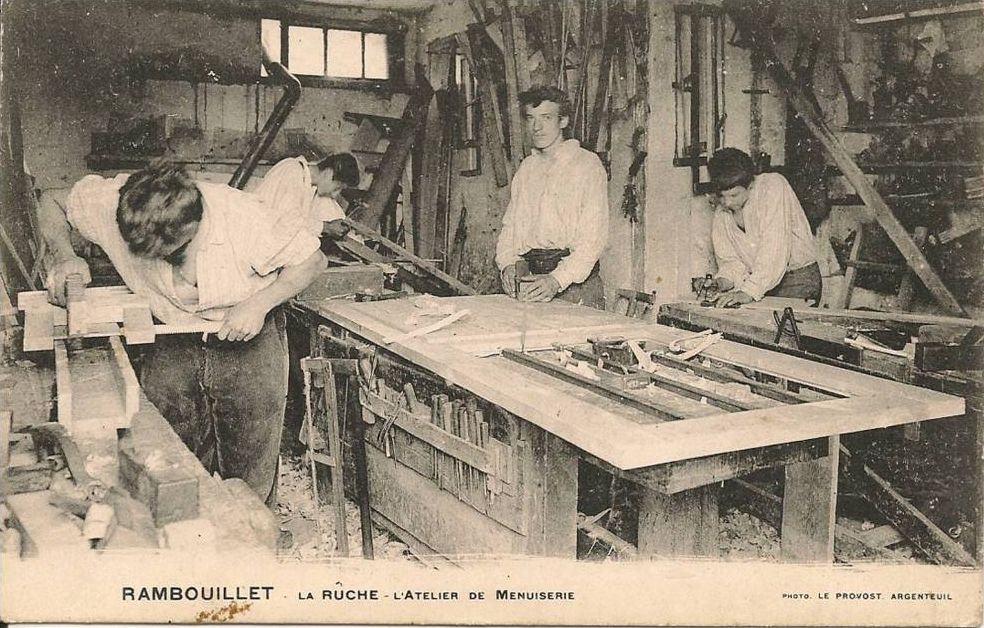 carte postale éditée par l'imprimerie de la Ruche de Rambouillet : les garçons apprennent la menuiserie